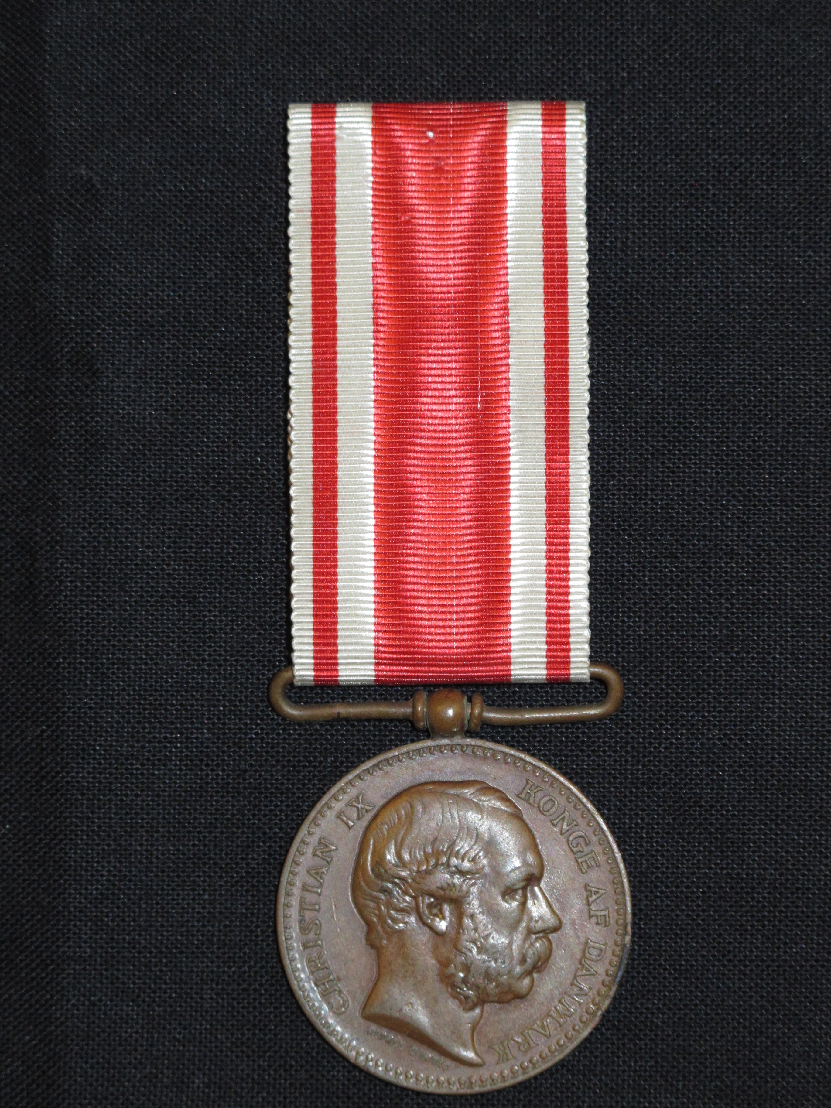 Erindringsmedalje for krigsdeltagelse i krigen 1864.